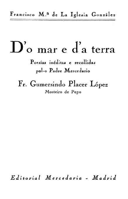 Do mar e da terra